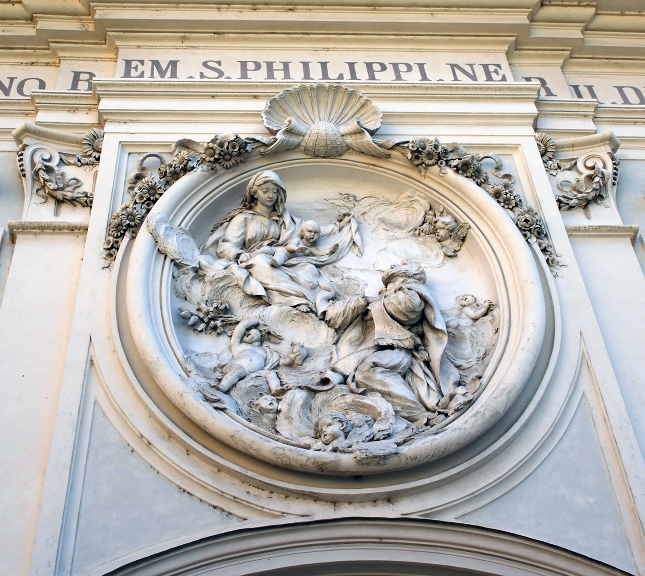 Altorilievo nella facciata della chiesa di San Filippo Neri in Via Giulia